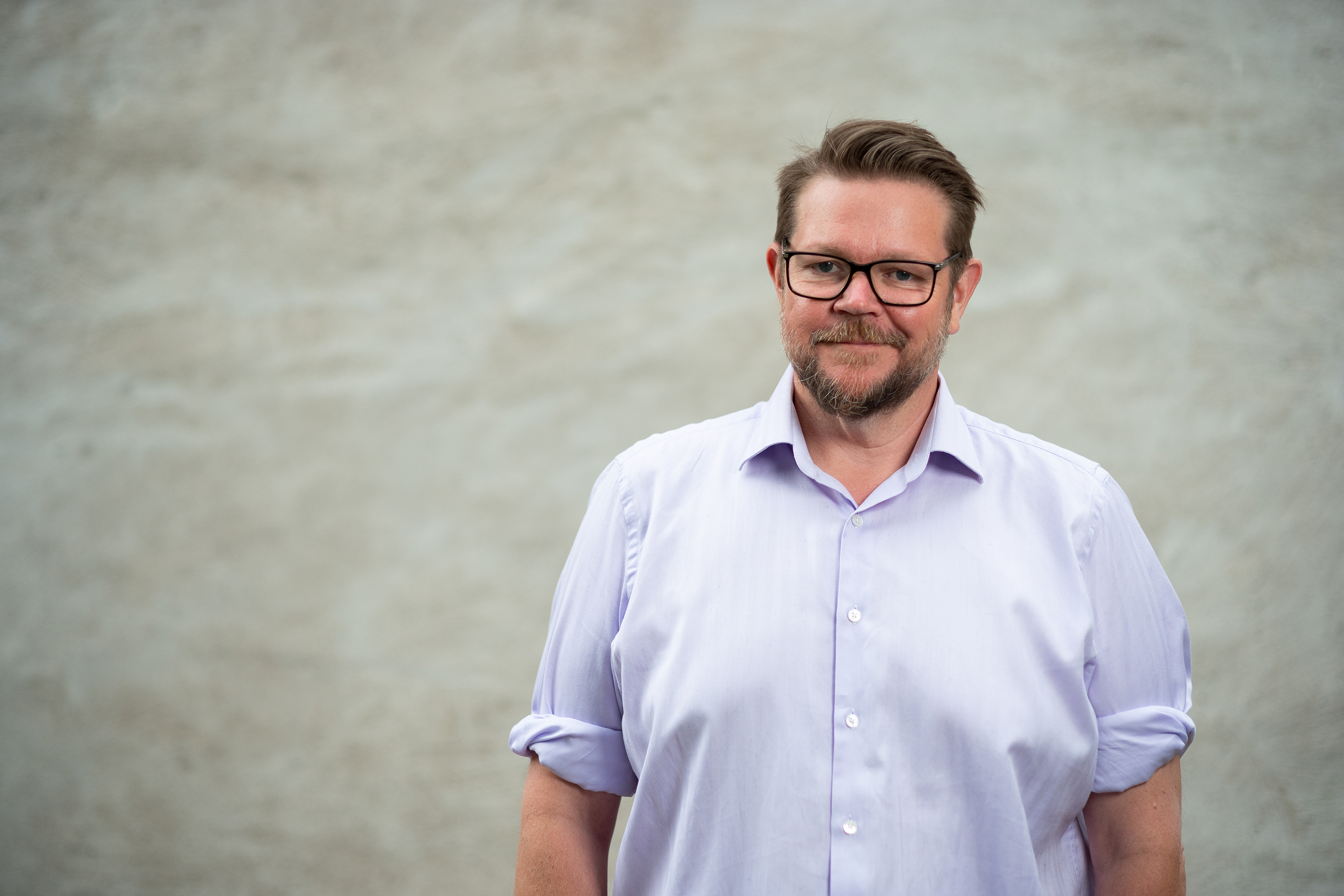 Johan Hedin, Riksdagsledamot för Centerpartiet.